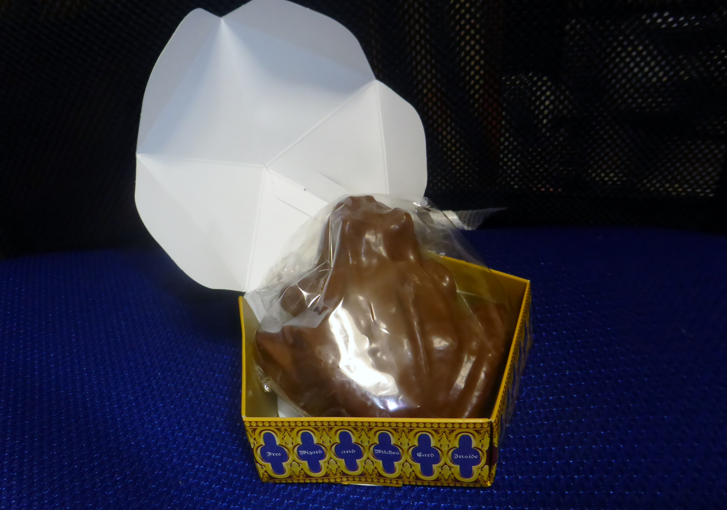 ハリーポッターに登場する蛙チョコレートの商品版を撮影。